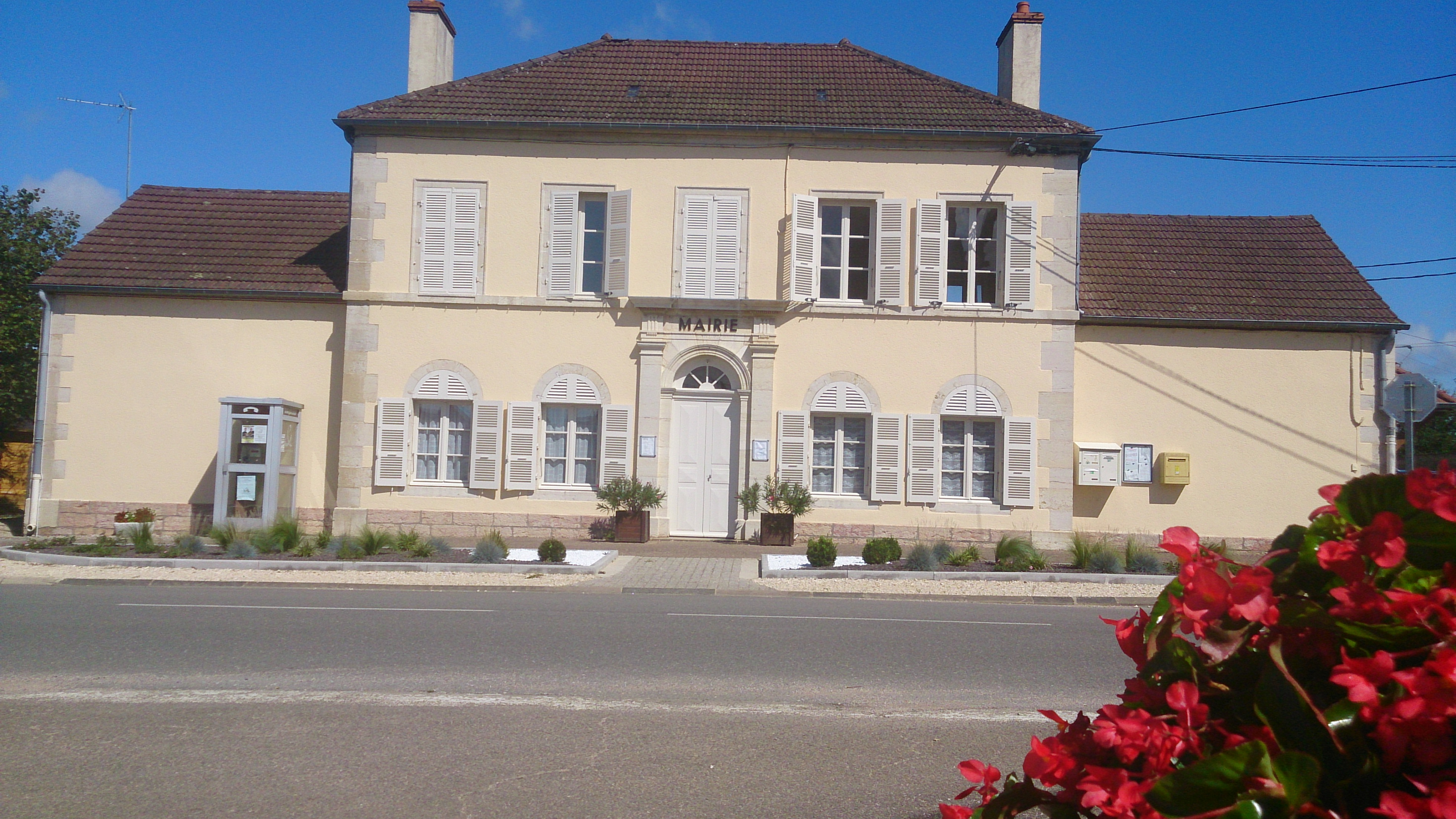 Labergement-Les-Auxonne, la mairie